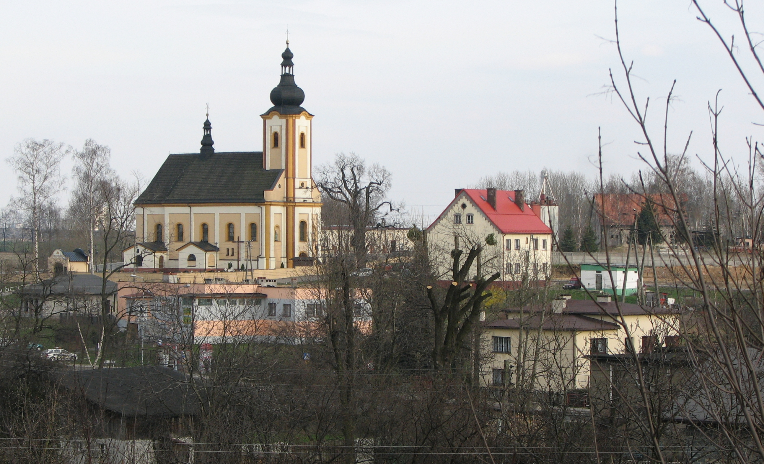 Kościół barokowo-klasycystyczny z XVIII w. w Szerokiej (dzielnica Jastrzębia Zdroju)